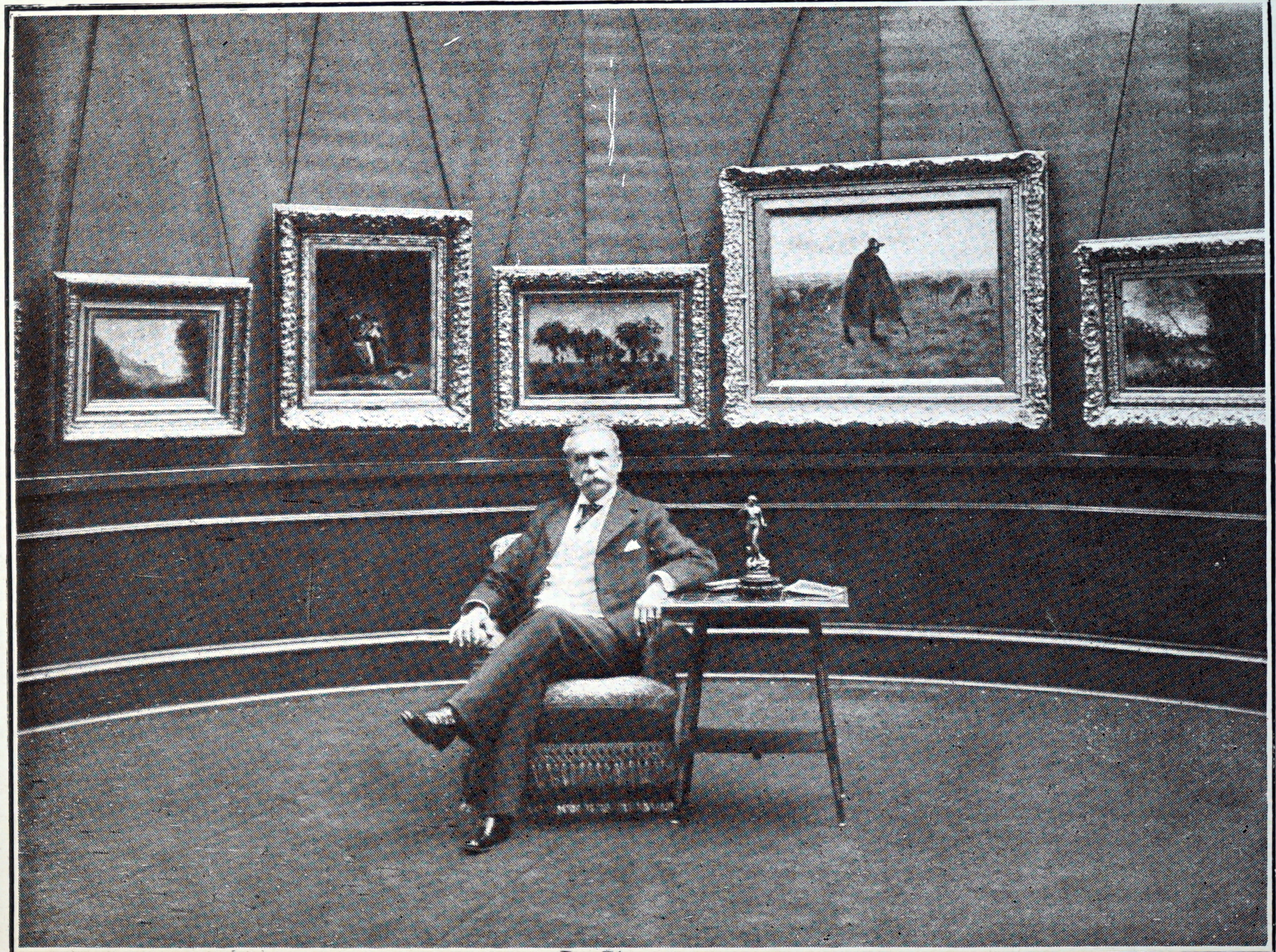 extrait du catalogue de la collection Vasnier.